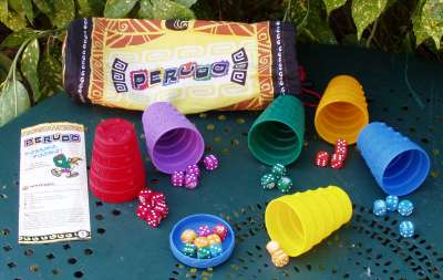 Jeu Perudo (Asmodée)